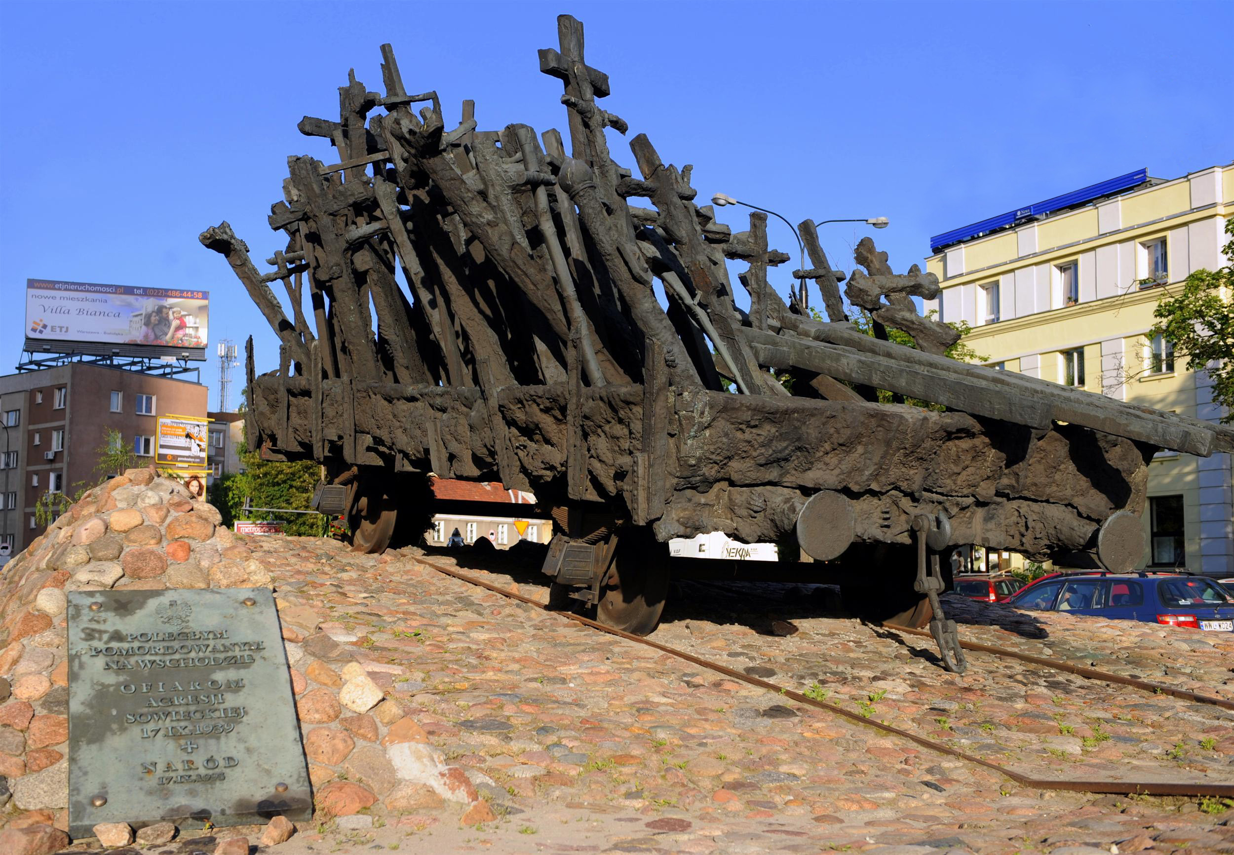 Pomnik Poległym i Pomordowanym na Wschodzie.